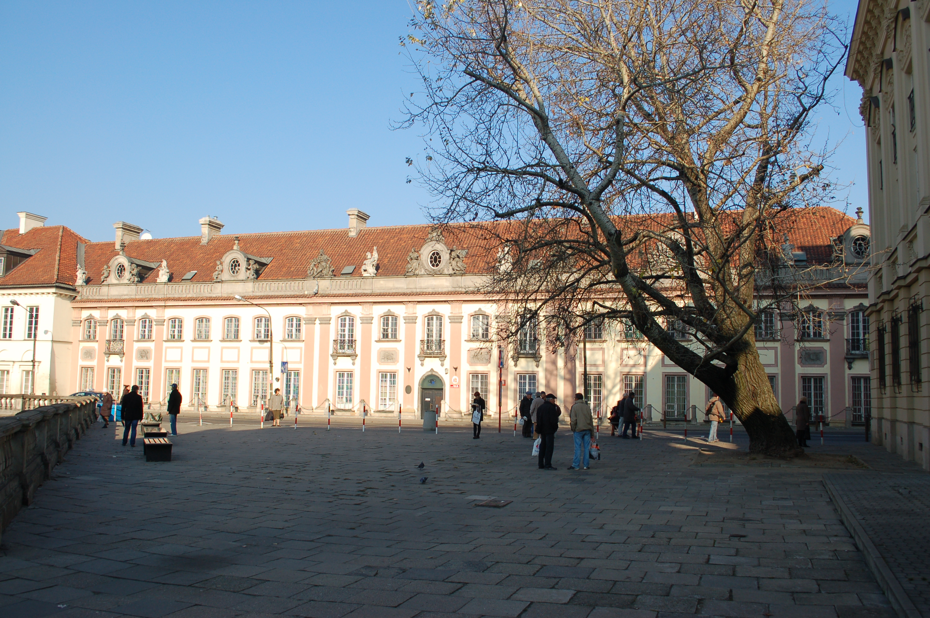 Warschau, Miodowa-Strasse